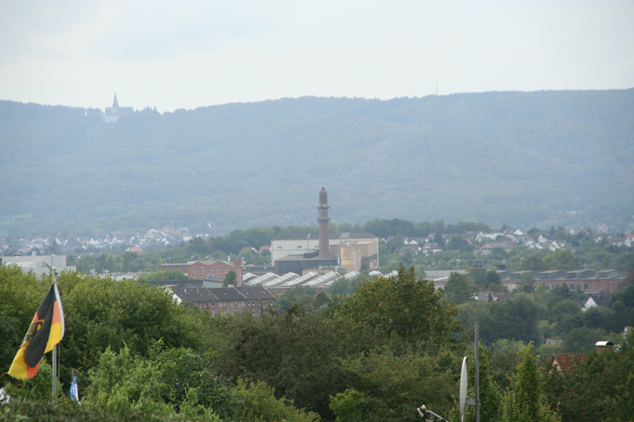 Das Mittelfeld in der Nordstadt nach Rothenditmold.